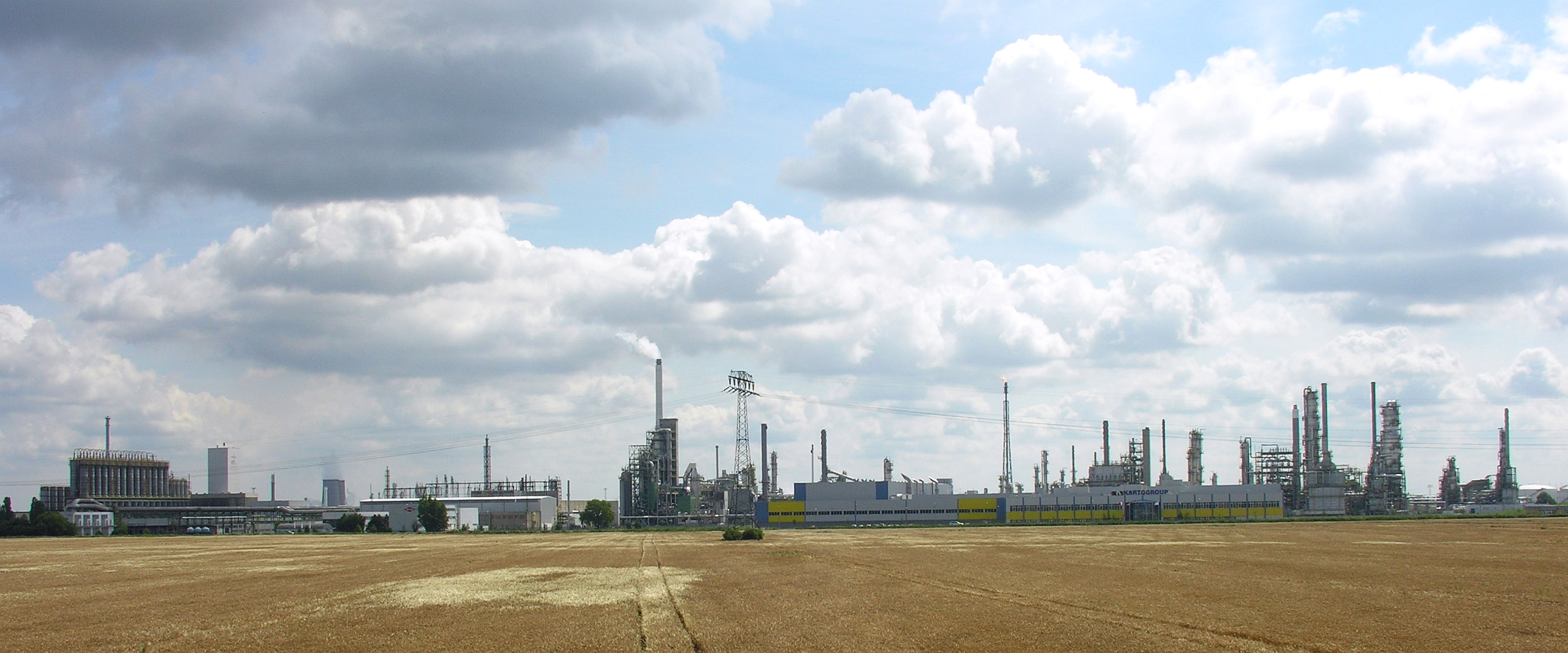 Industrie- und Chemiepark. Großteils unter Verwaltung der Infraleuna. Ein großer Teil der Nachwende-Investitionen (EU-gefördert) in das Gelände der ehemaligen Leunawerke wurde für die Raffinerie Total/Elf eingesetzt. Leuna, Sachsen-Anhalt. Foto 2009 Wolfgang Pehlemann DSCN2964